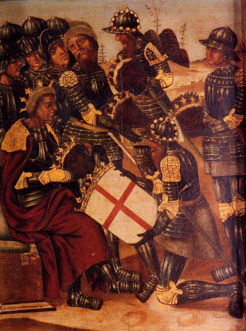 Creu de Sant Jordi al Retaule de Sant Jordi de l'Església Sant Salvador de la Mercé, Teruel